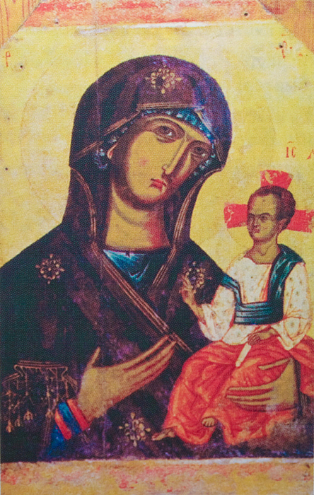 Icon "Volynian Mary"